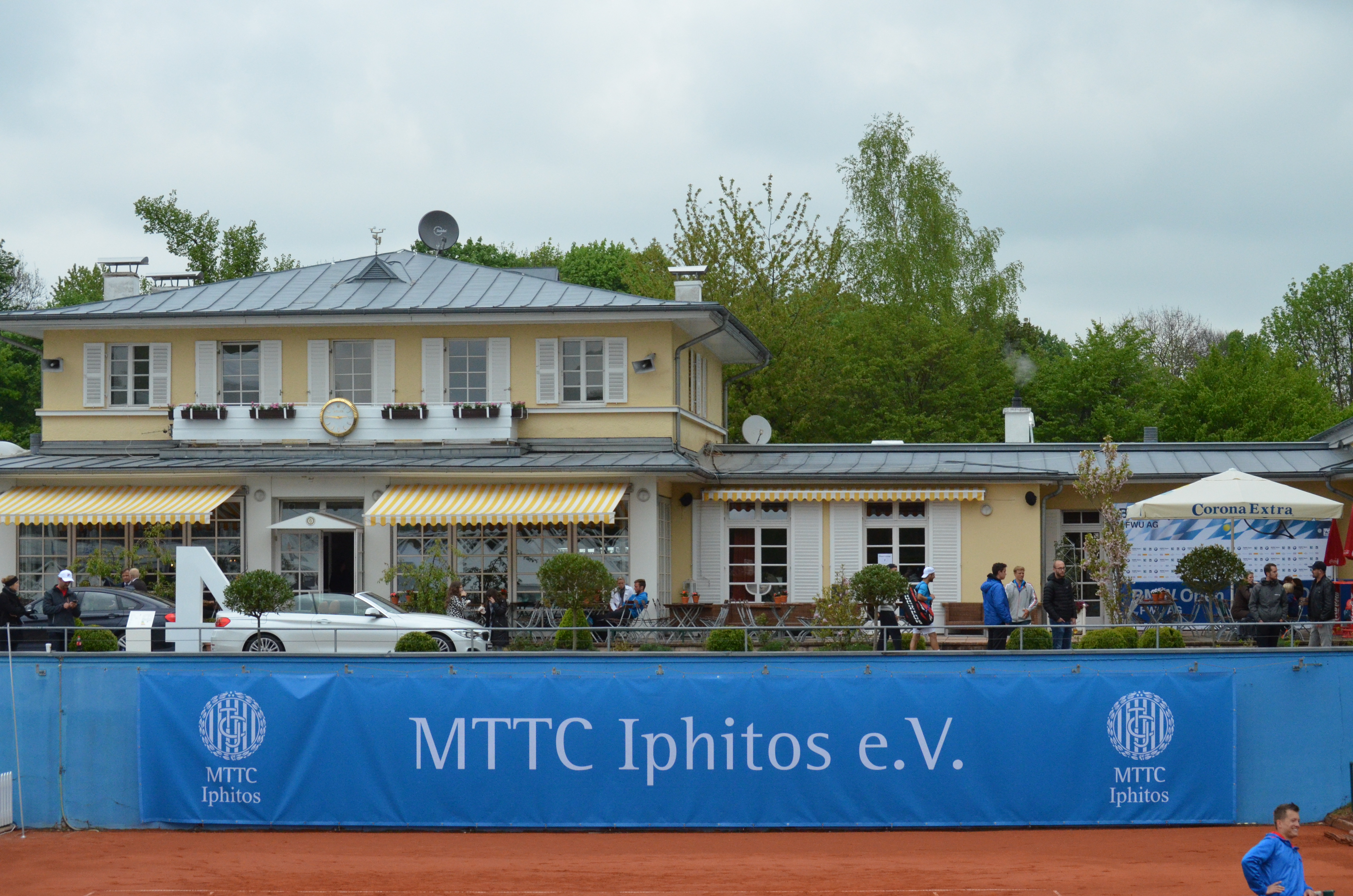 Anlage des MTTC Iphitos München bei den BMW Open 2014